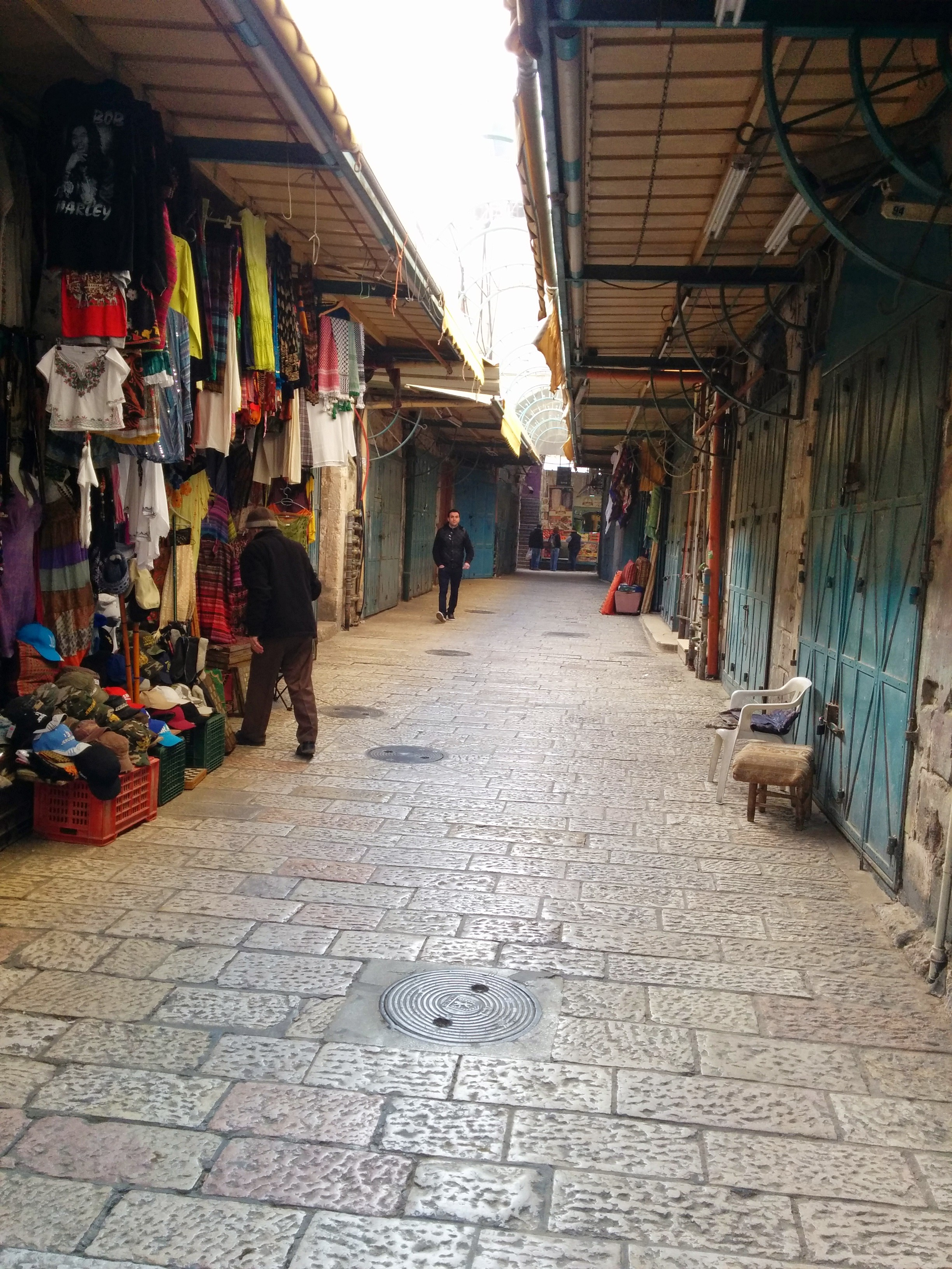 Christianity in Jerusalem נצרות בירושלים